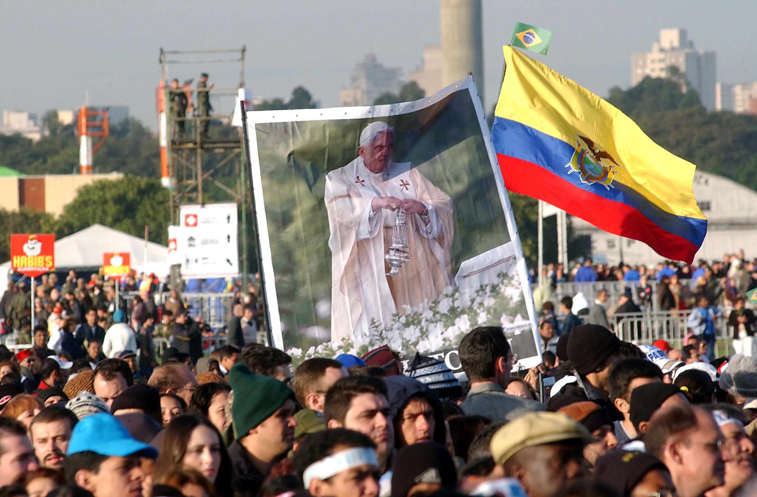 Cerimônia de canonização do frade brasileiro Frei Galvão celebrada pelo papa Bento XVI no Campo de Marte em São Paulo, Brasil.